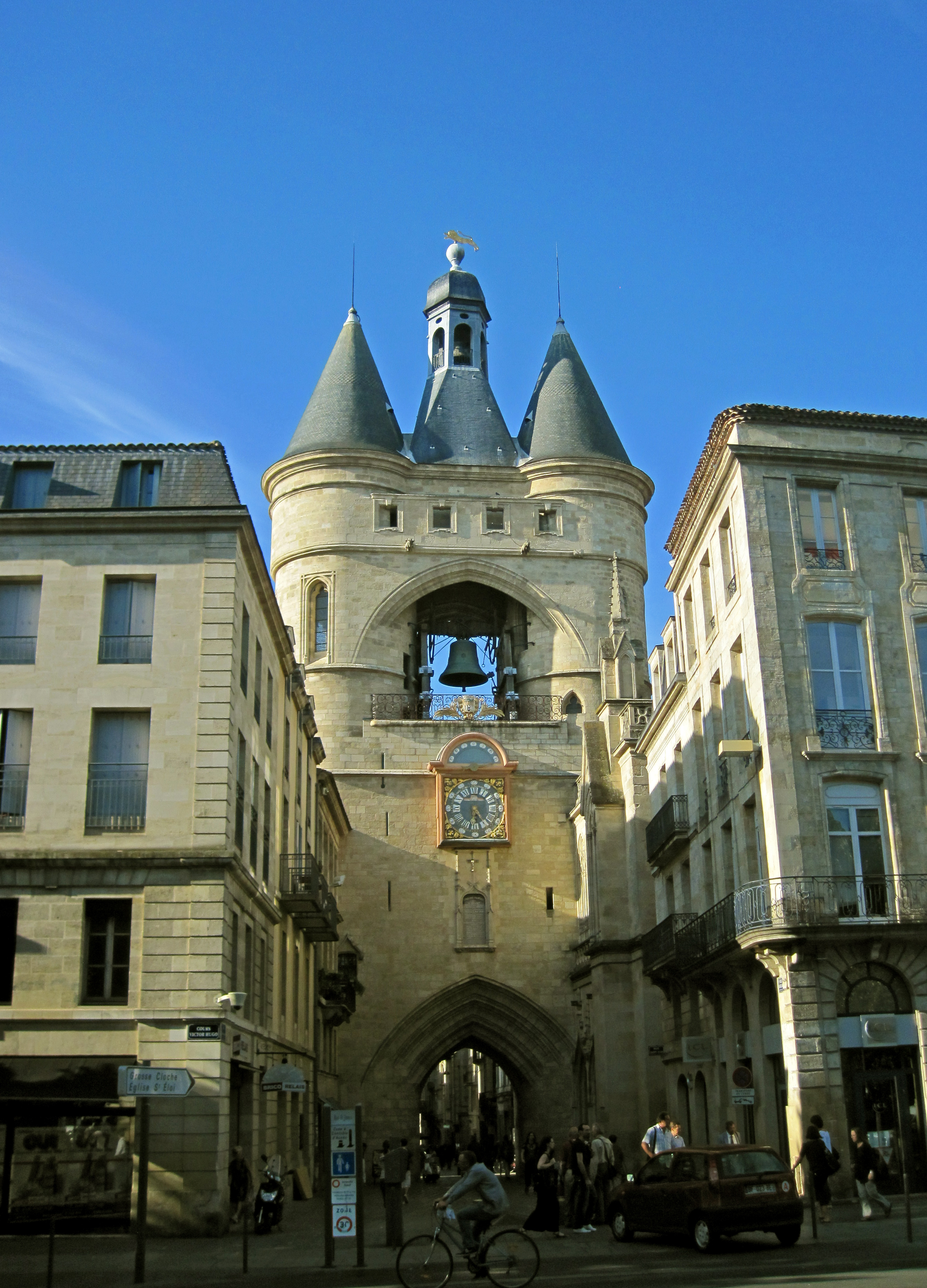 Enceinte médiévale, la Grosse cloche. Vue depuis le cours Victor Hugo. Époque de construction : 13e siècle. .